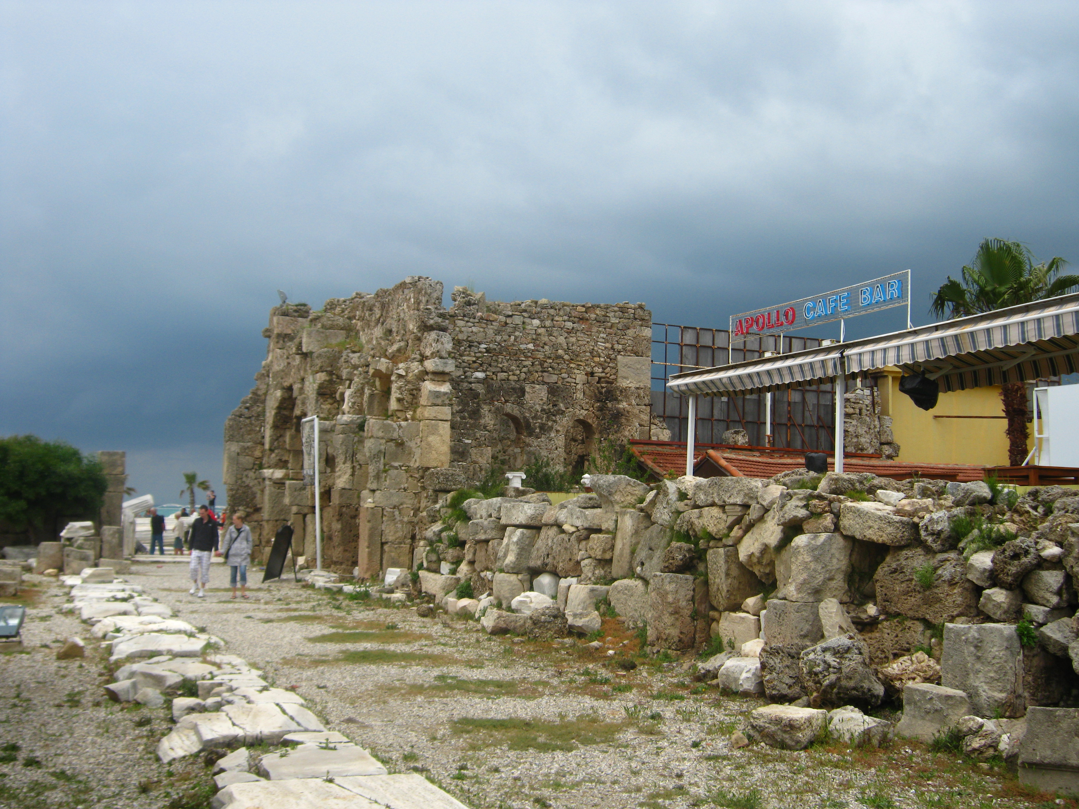 "Південна базиліка". Північна нава базиліки.